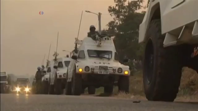 Un convoi de casques bleus sénégalais lors des mutineries à Yamassoukro (Côte d'Ivoire) le 17 janvier 2017.